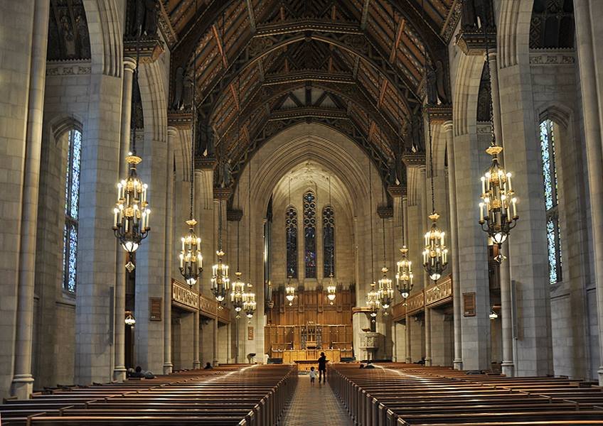 Interior